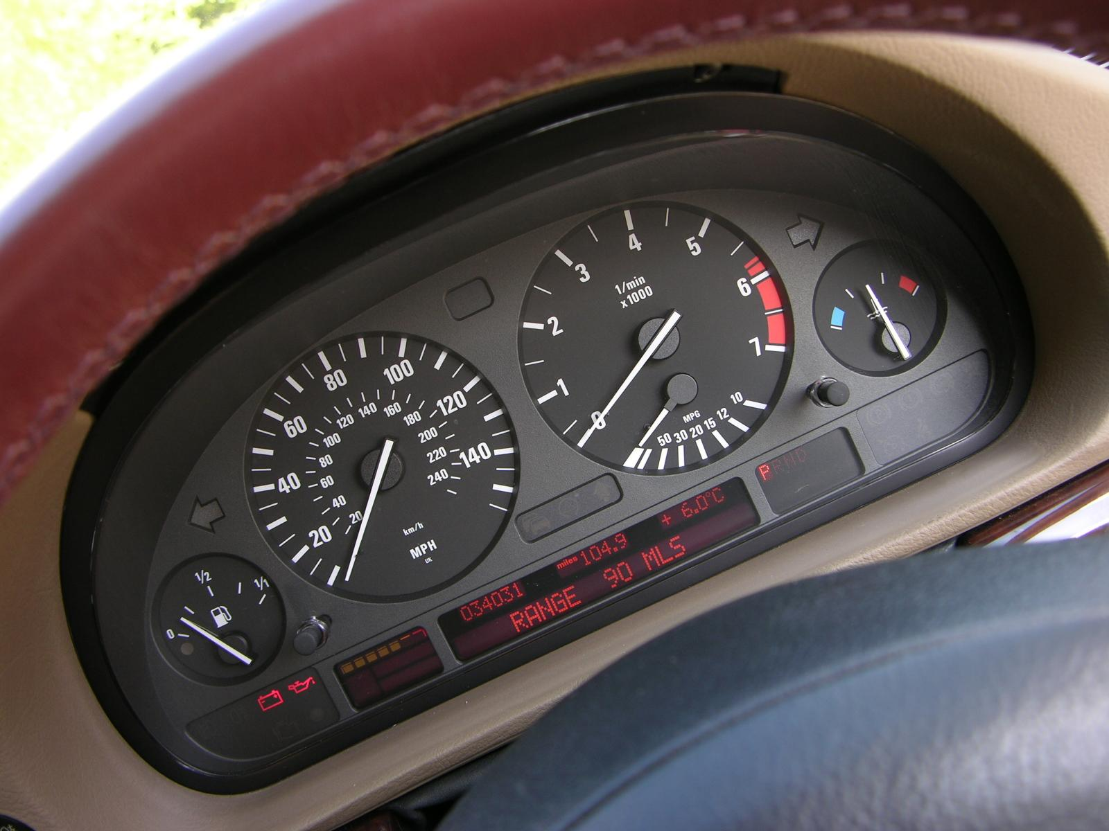 1998 BMW 740i Individual